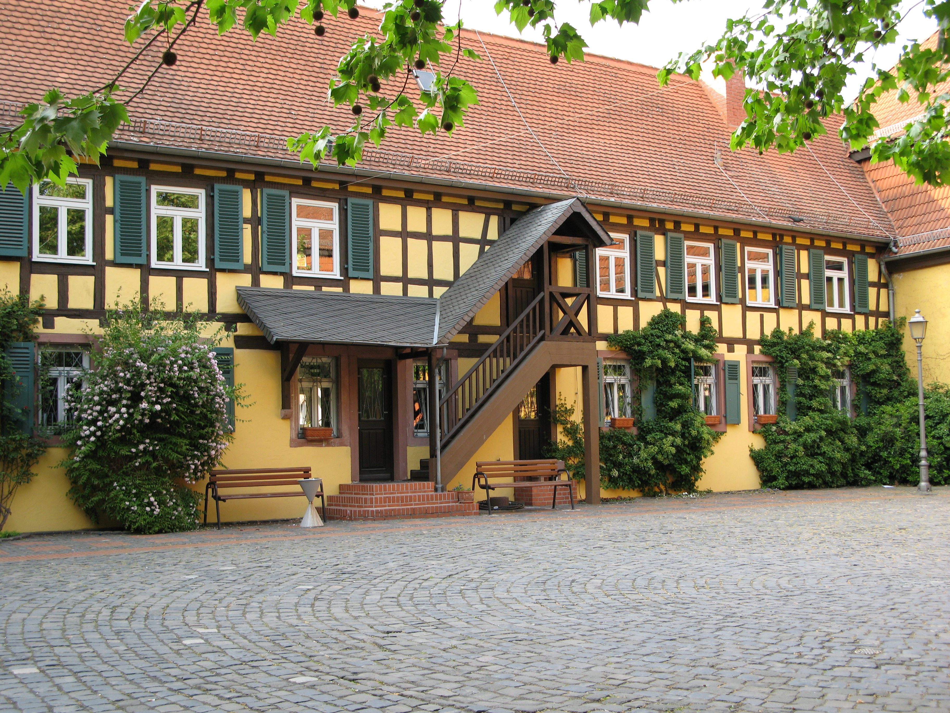 Hattersheim Posthof